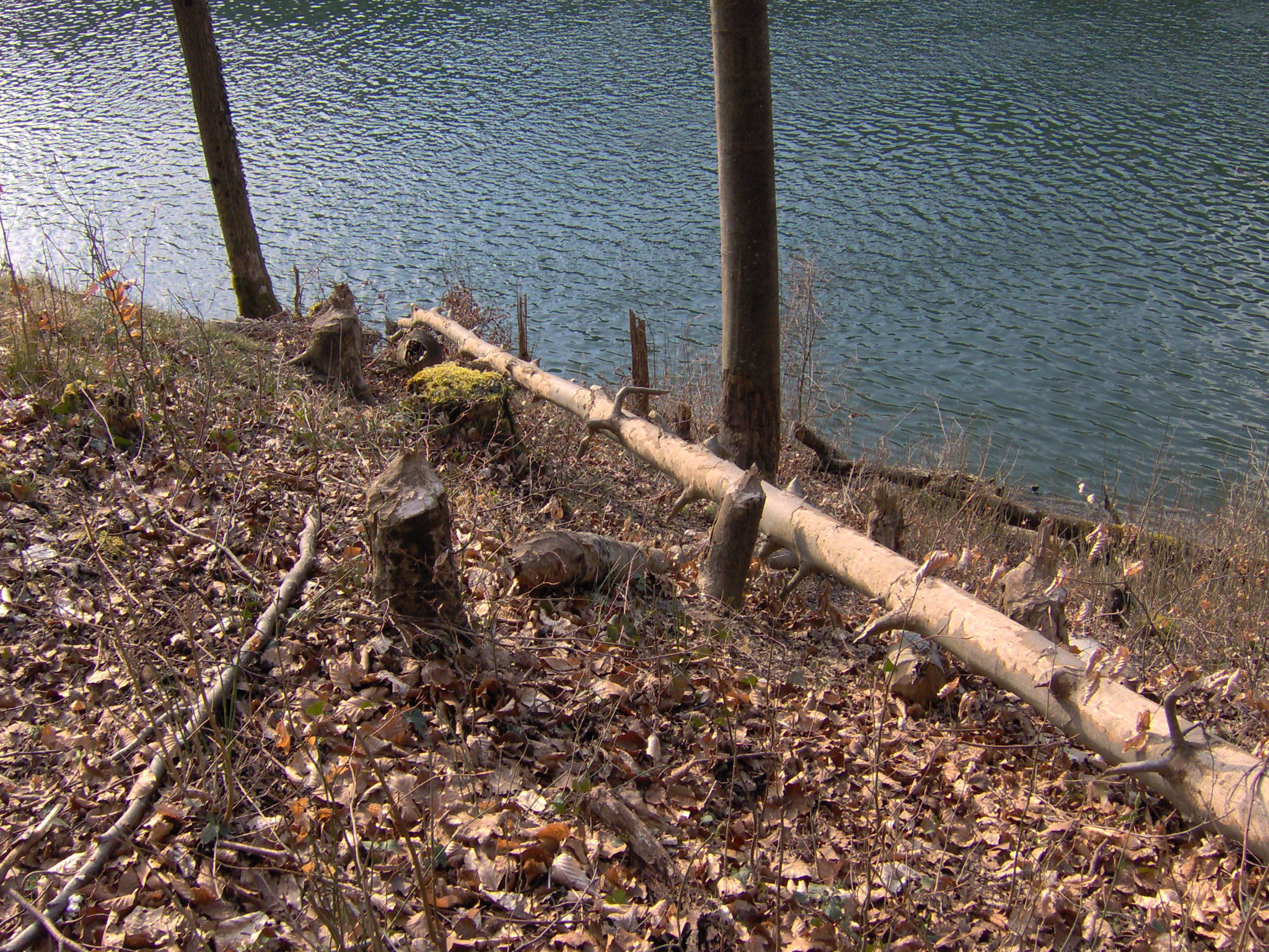 Abhang von Bibern abgeholzt, zwischen Toessegg und Ruedlingen